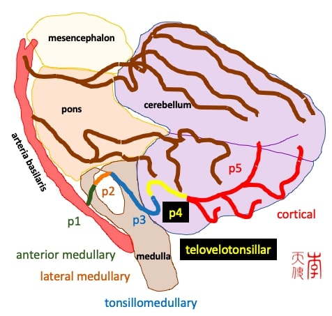 Segmentos de la PICA, antigua y nueva nomenclatura: • bulbar anterior (s1) - verde • bulbar lateral (s2) - naranja • tónsilobulbar (s3) - amarillo • telovelotonsilar (s4) - azul • cortical (s5) - rojo